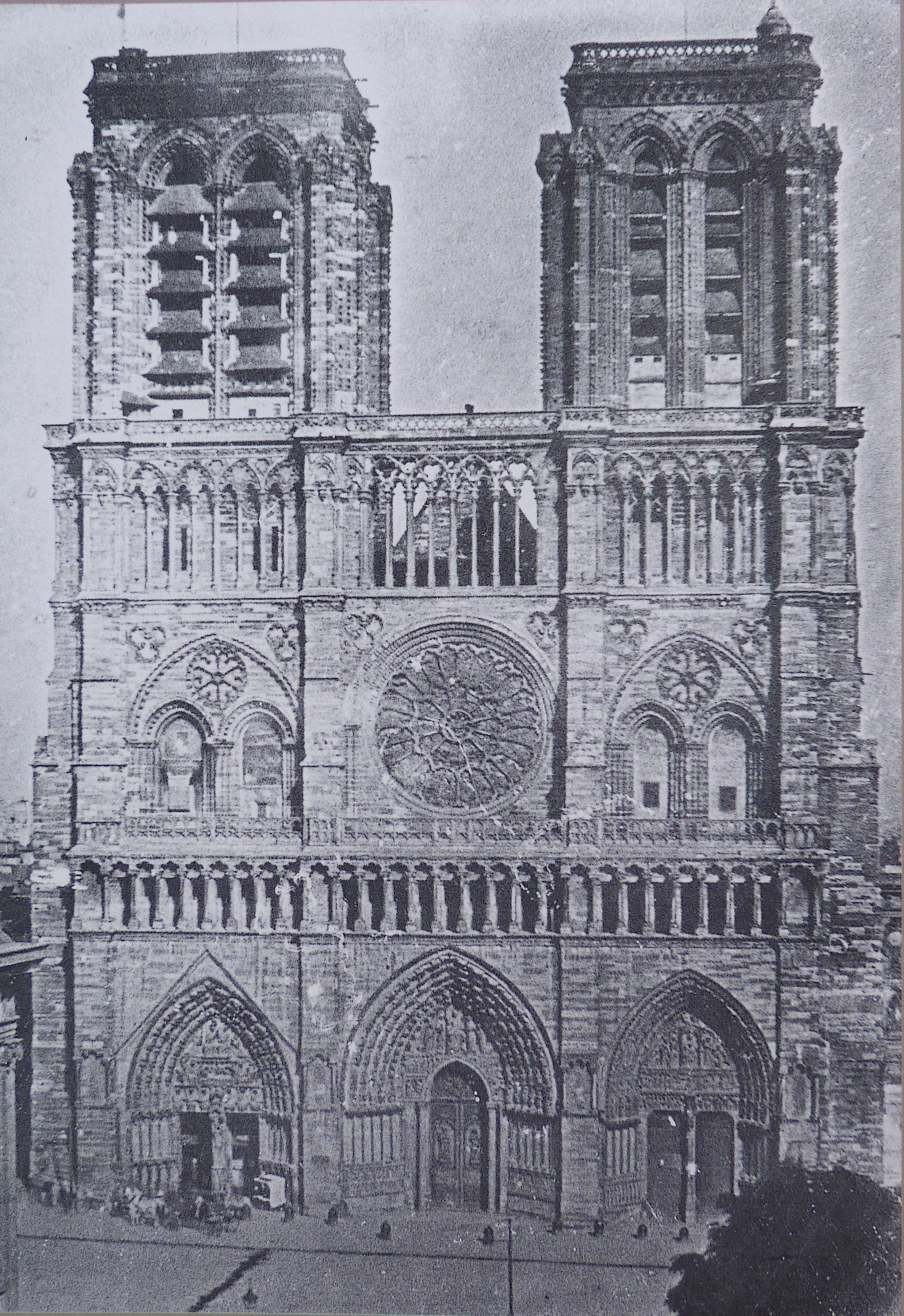 Façade de Notre-Dame de Paris, daguerréotype de Vincent Chevalier (1770-1841) - Collection particulière.